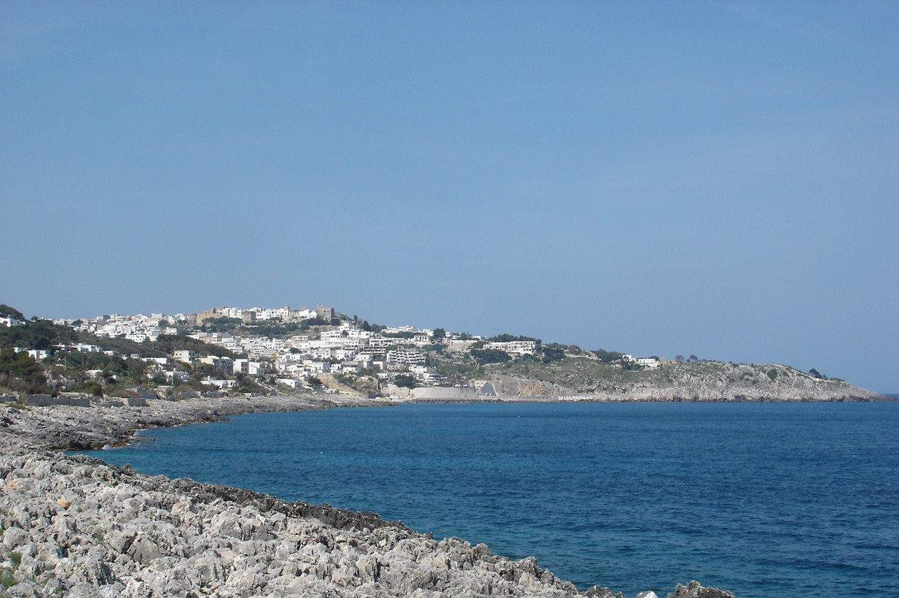 Castro vista da Marittima